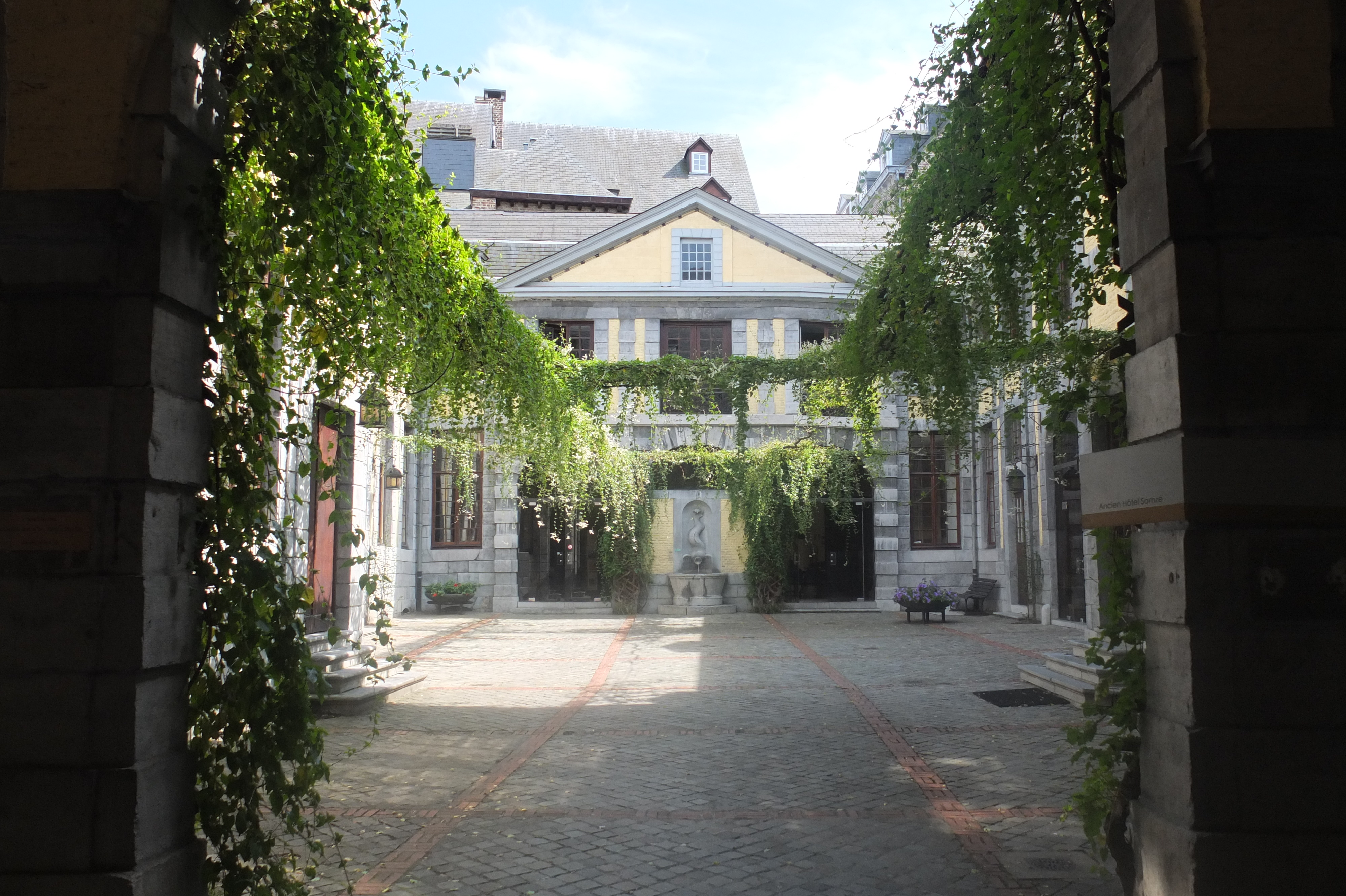 Aujourd'hui, cet ancien hôtel liégeois abrite l'actuel échevinat de l'Urbanisme